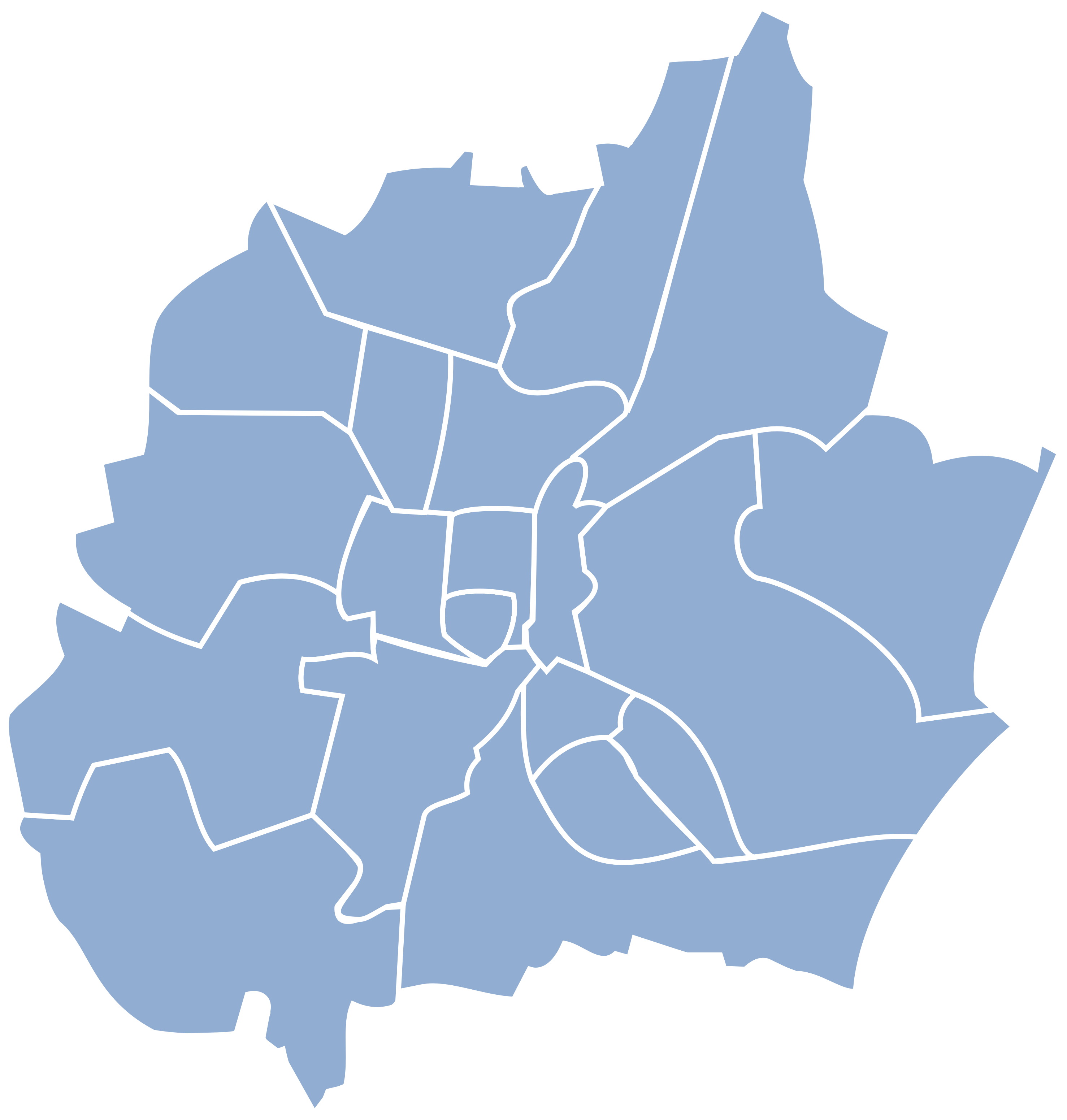 Dzielnice Częstochowy.